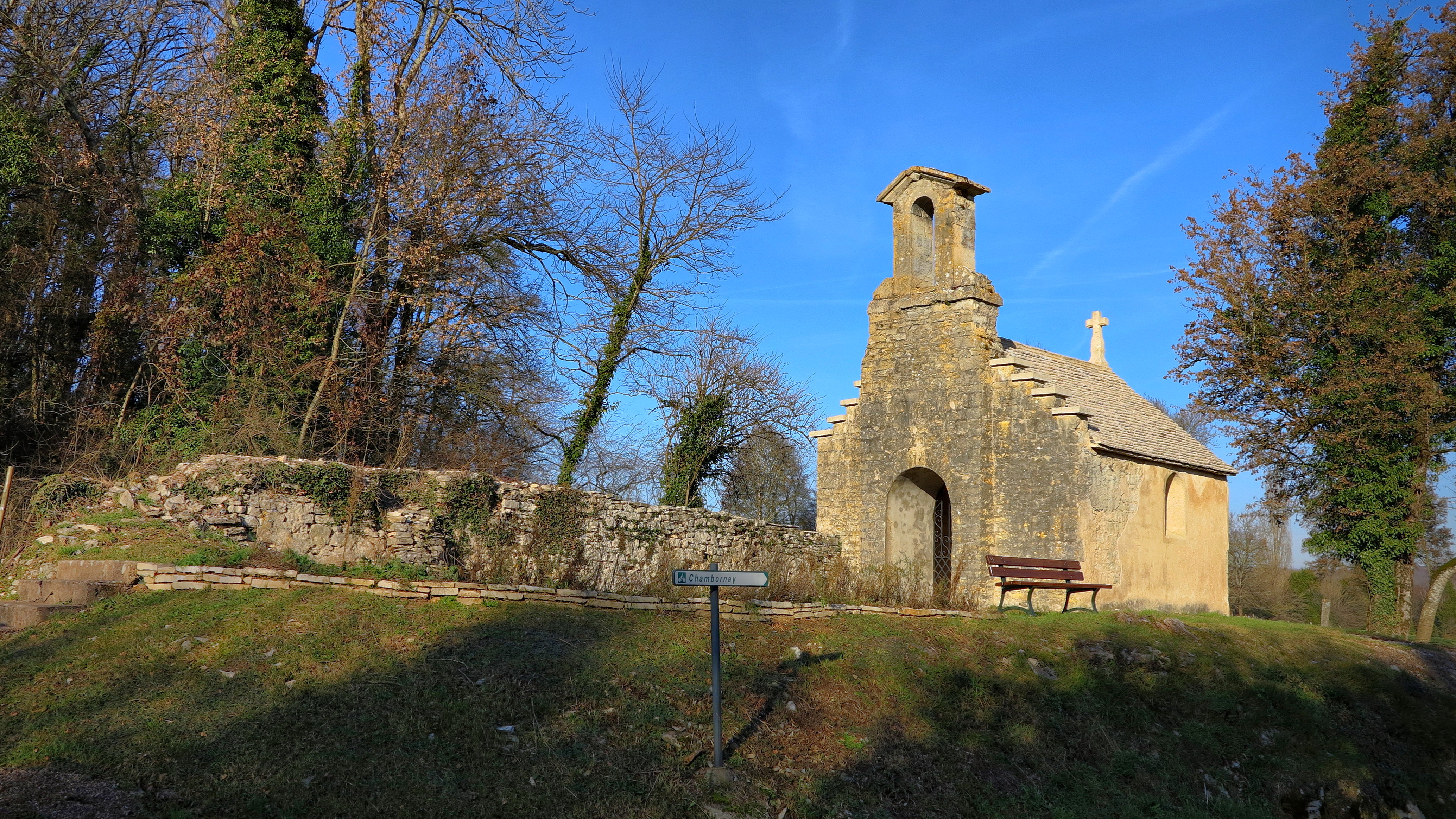 Chapelle Saint-Justin de Chambornay-lès-Bellevaux